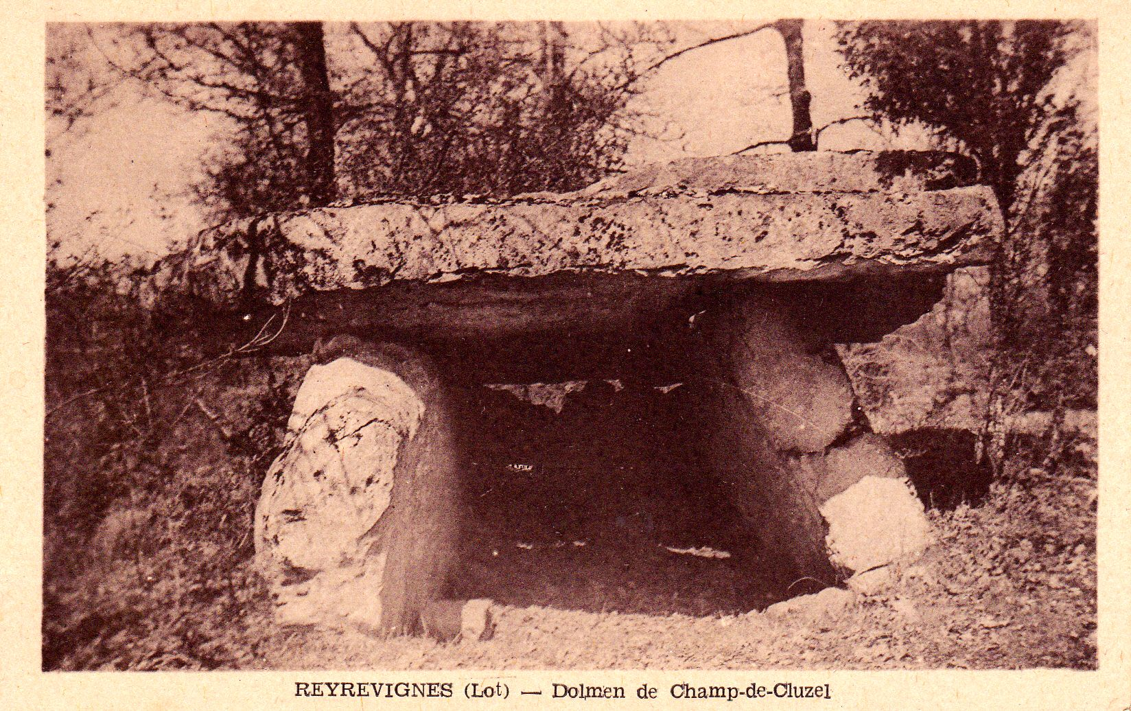 Dolmen du Champ-de-Cuzer, Lot